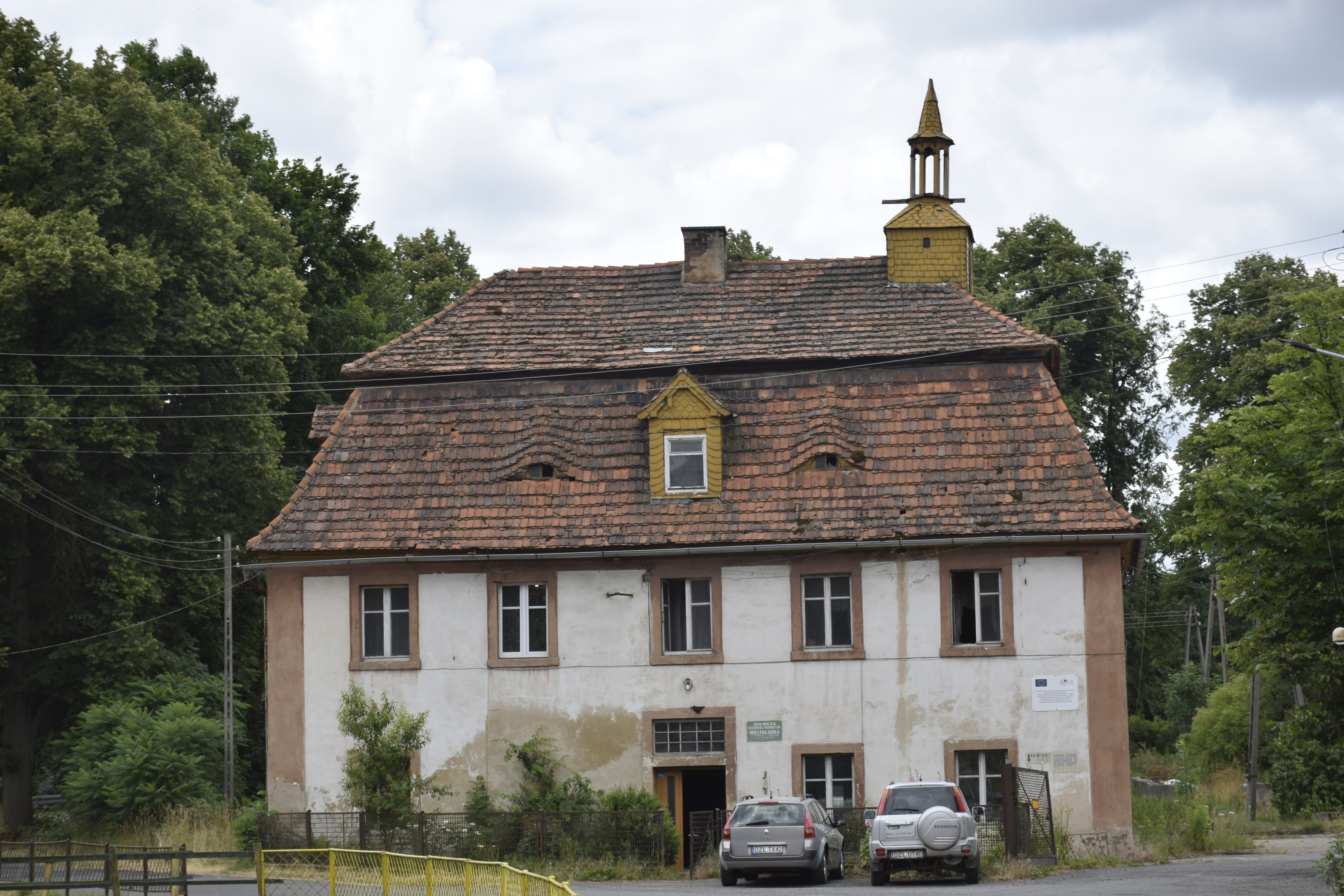 Sędziszowa (województwo dolnośląskie). Polska.